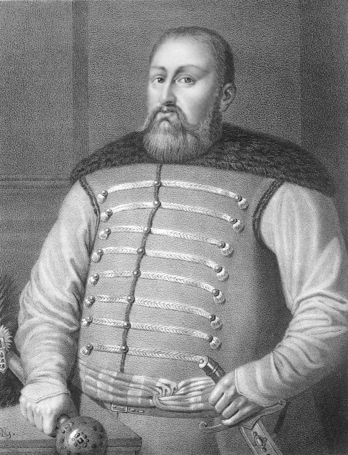 Mikołaj Potocki